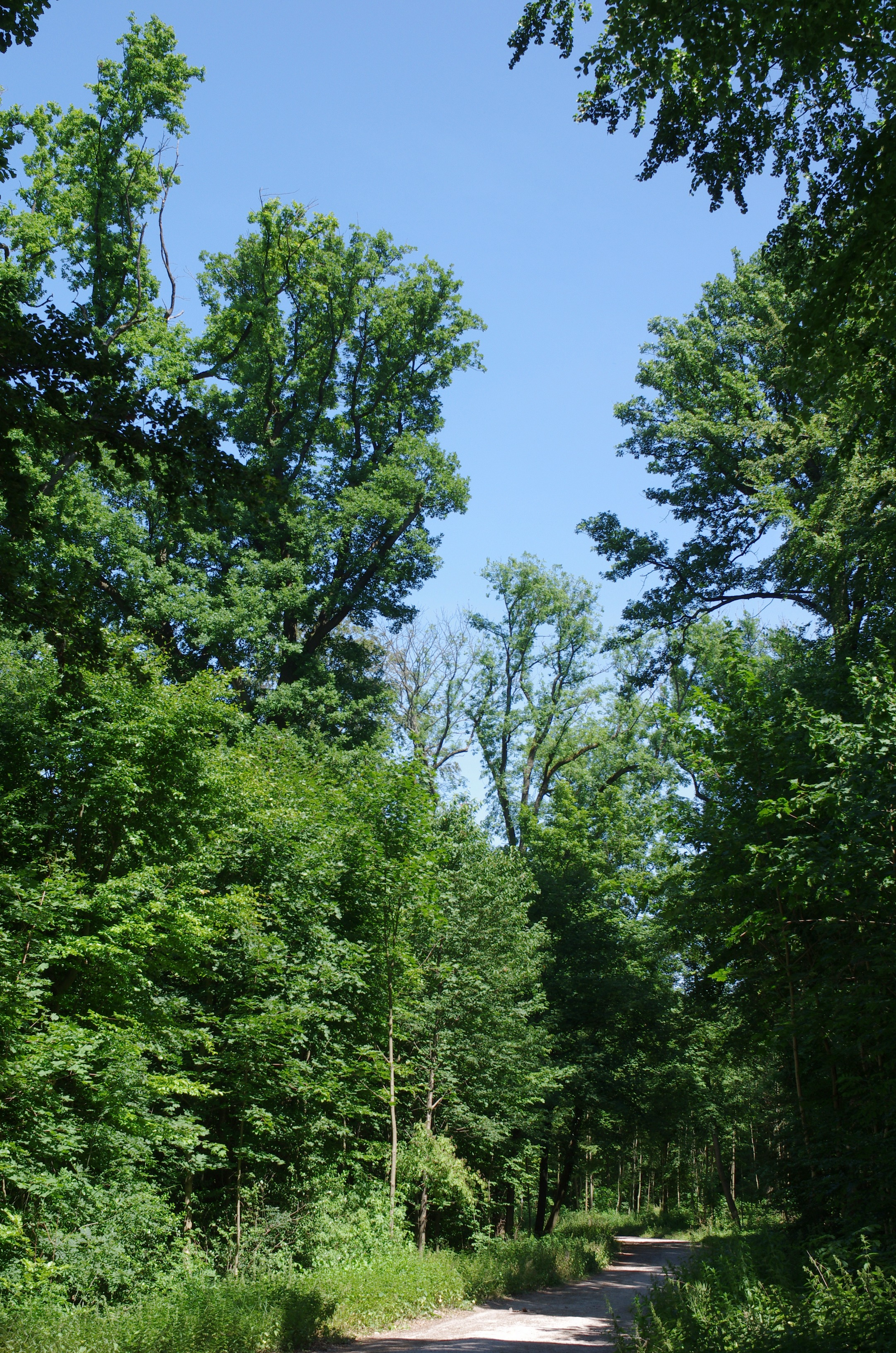 Naturschutzgebiet Markbach und Jagdhäuser Wald, zwischen Dargonerdenkmal und Jagdhaus